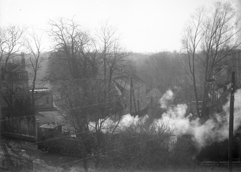 Tramway de Verneuil à Melun, vers 1925, dans la traversée de Trois-Moulins (Seine-et-Marne)